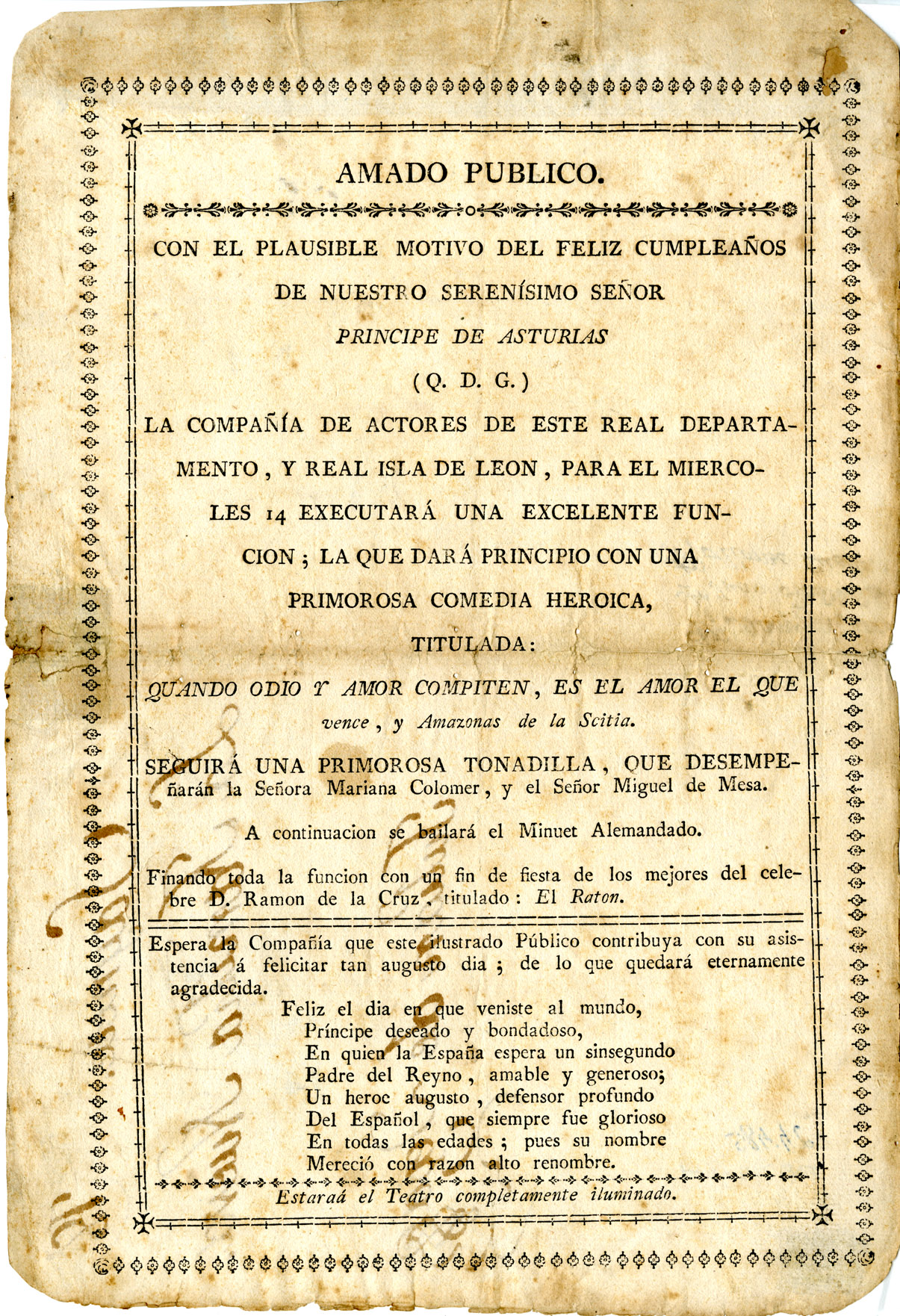 Anunci de la companyia d'actors de la Real Isla de León, d'una representació amb motiu de l'aniversari del príncep d'Asturies Ferran VII. 14 d'octubre de 1807. Fons de programes R.24405